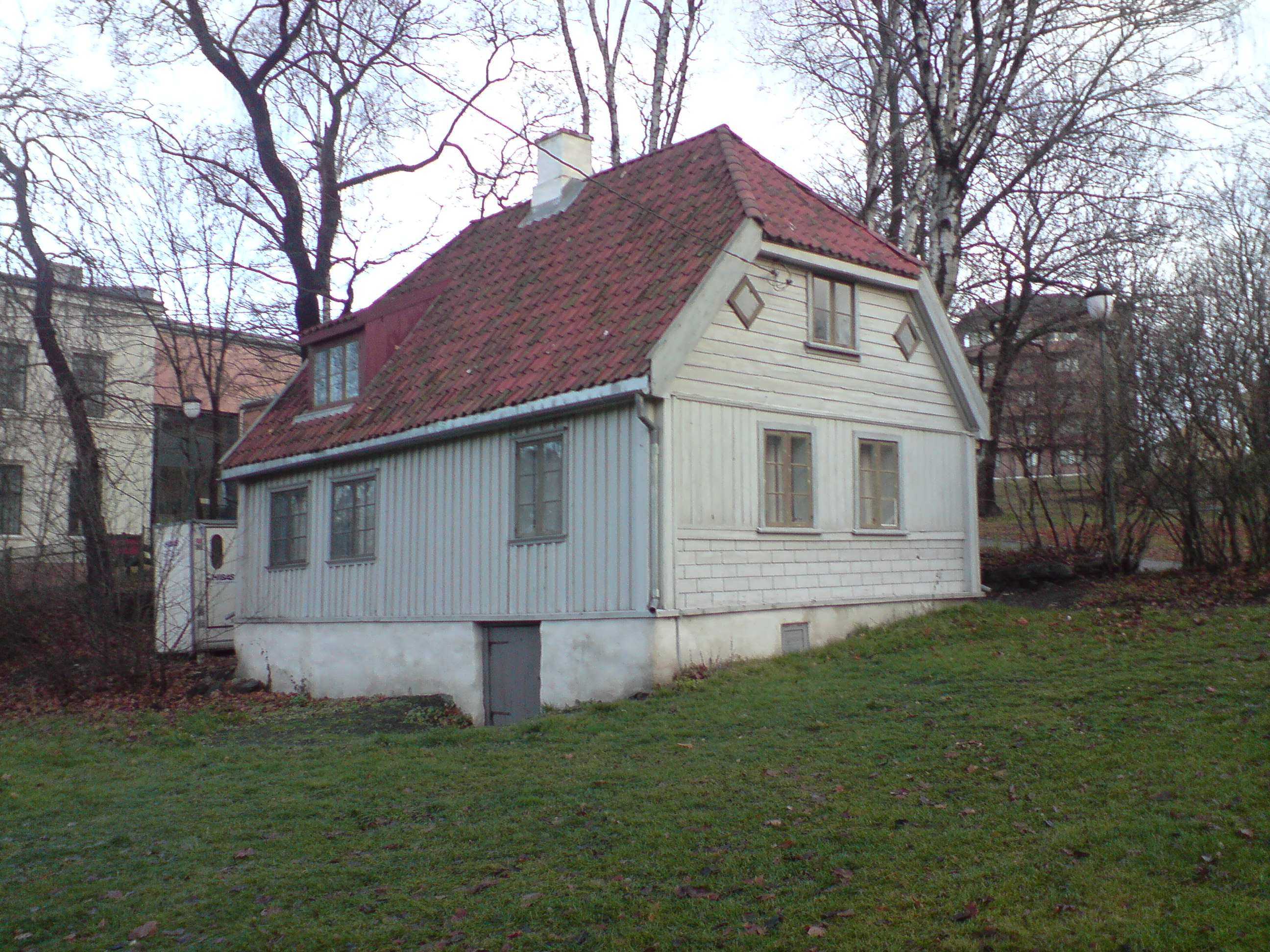 Small house on Galgeberg, Oslo